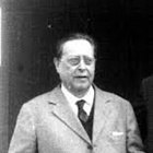 фотография итальянского поэта Джованни Титта Роза, сделанная до 1972 года; автор не известен